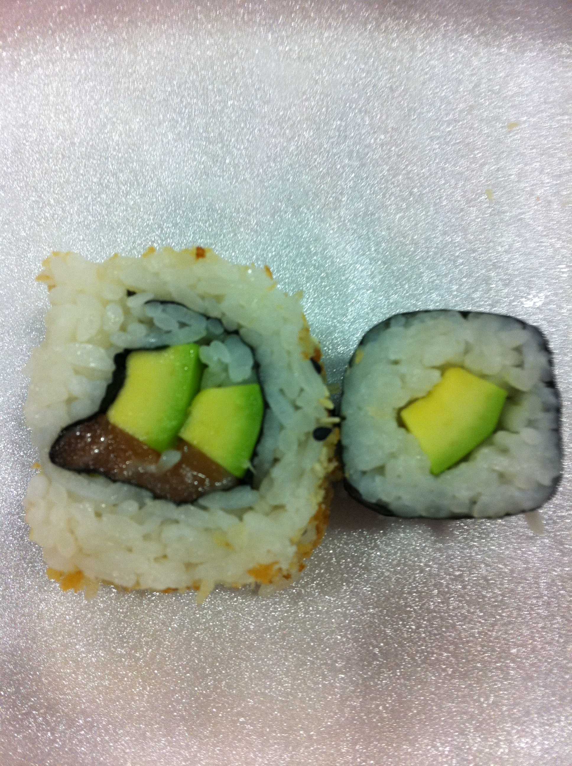 סושי סלמון רול-אינסייד אוט לצד סושי צמחוני.